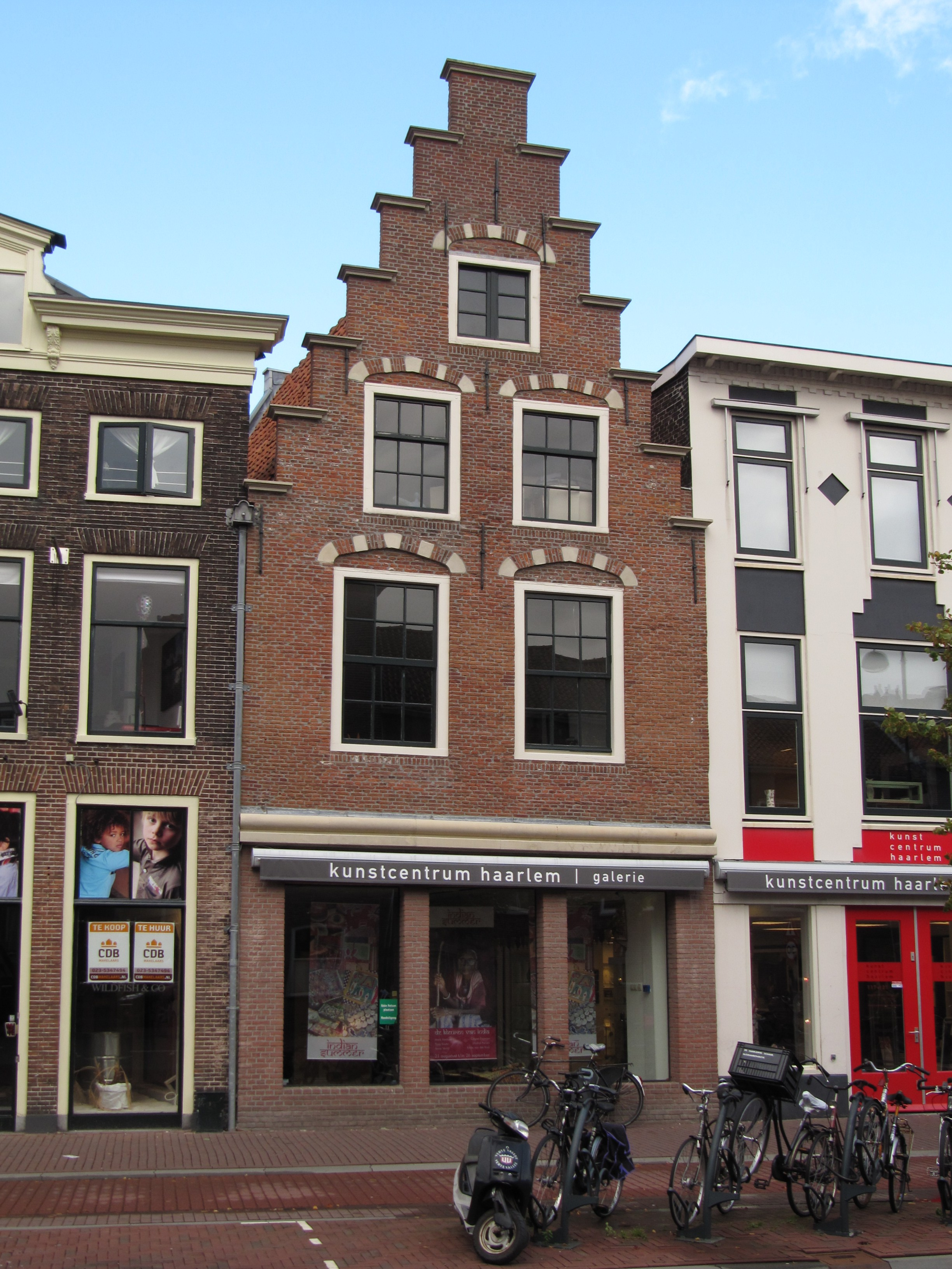 RM19125 Haarlem - Kunstuitleen Haarlem, Gedempte Oude Gracht 117.jpg